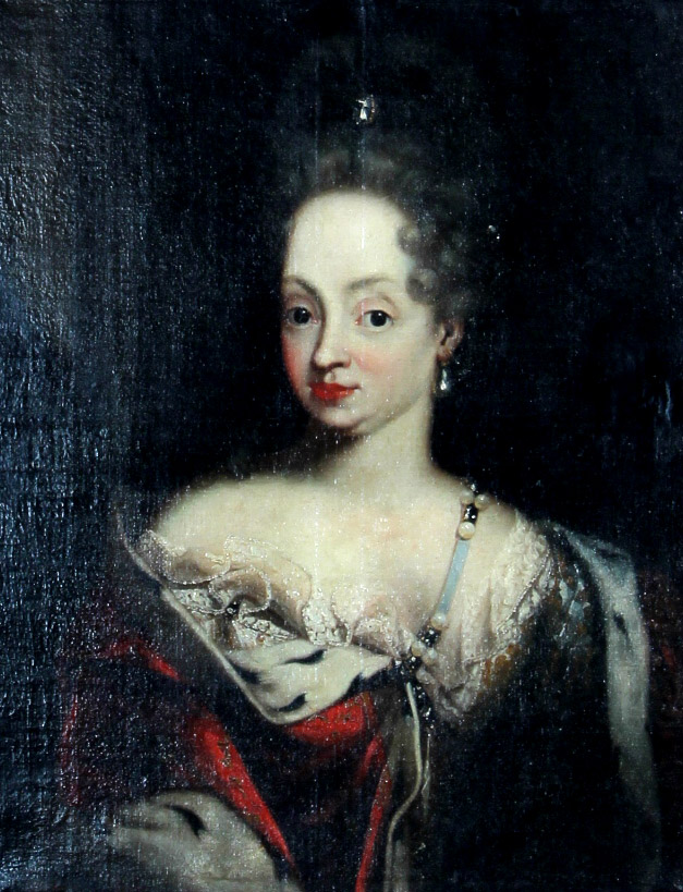 Jacques d'Agar, 1642-1715 portræt af Louise af Mecklenburg-Güstrow, Frederik IV's dronning, malet ca. år 1700